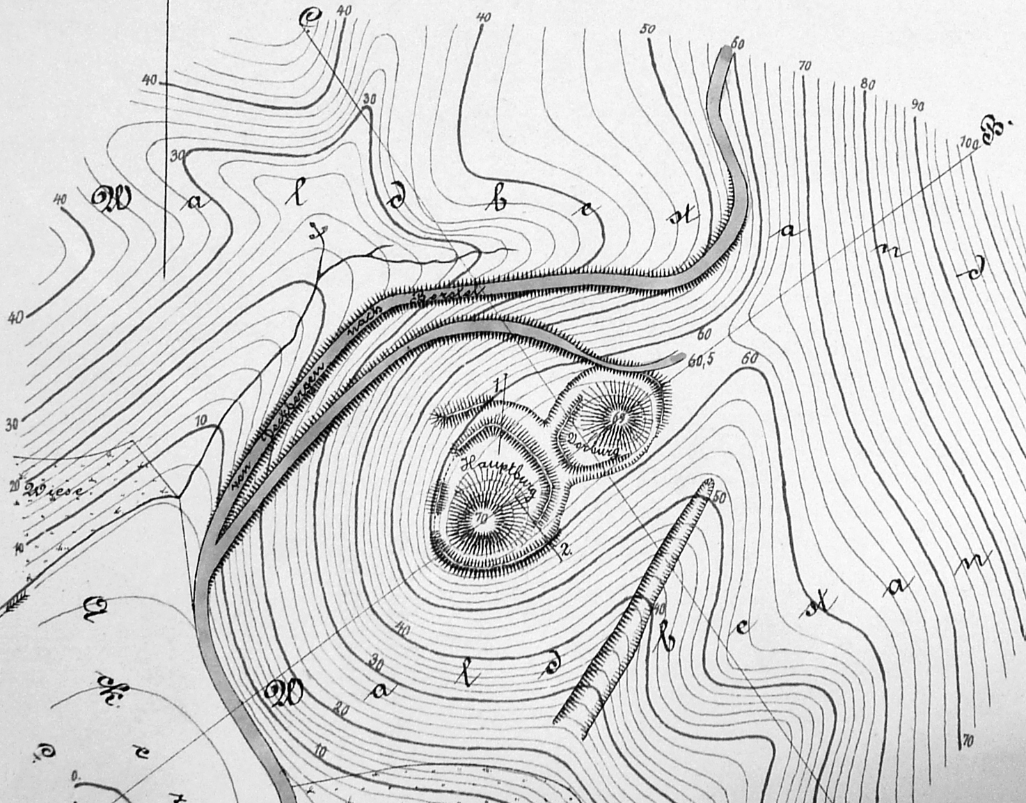 Osterburg